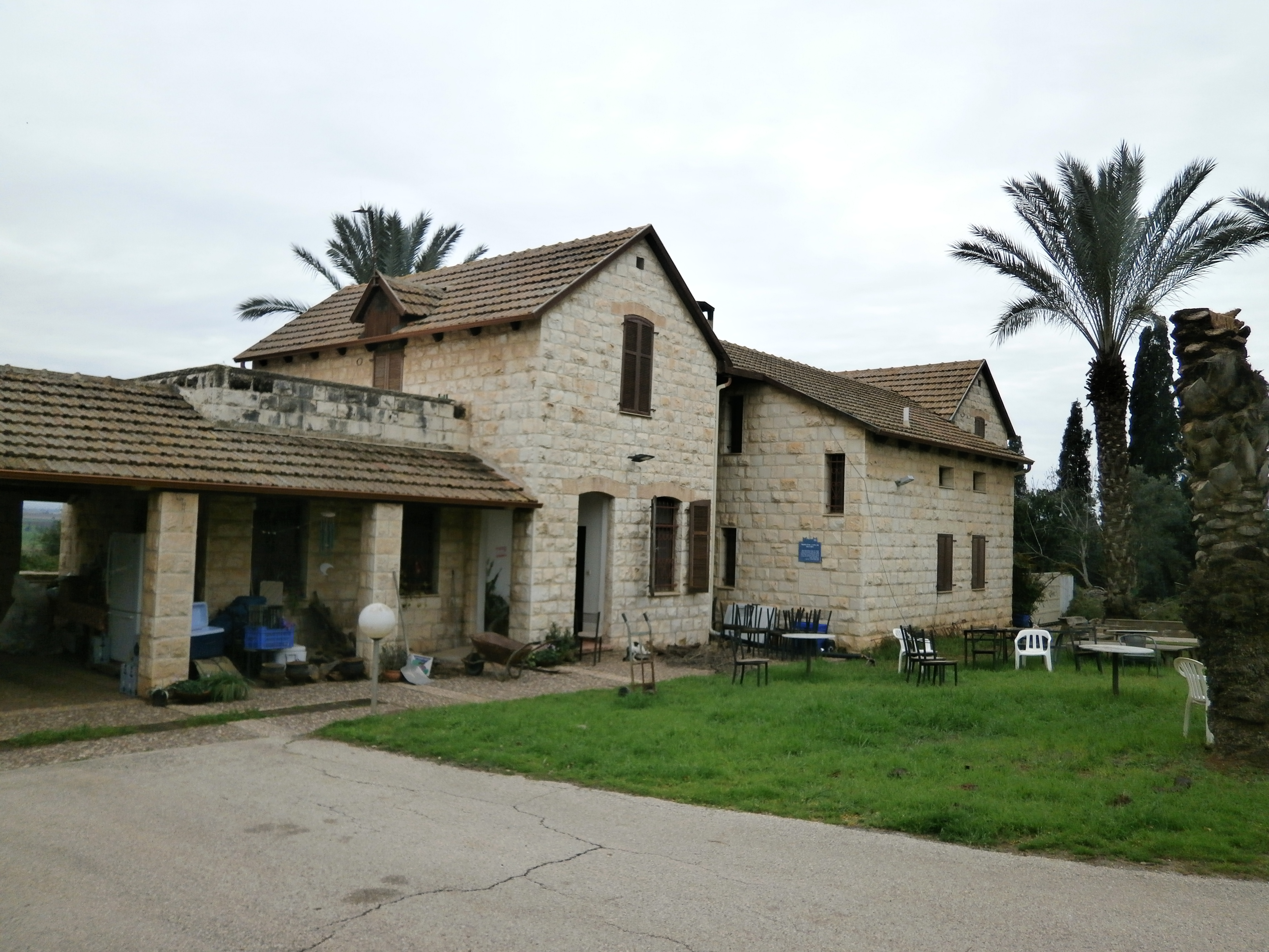 מושב מרחביה